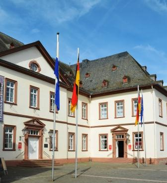 Neues Schloss in Simmern/Hunsrück, beherbergt das Hunsrück-Museum Simmern, die Stadtbücherei und die Tourist-Information